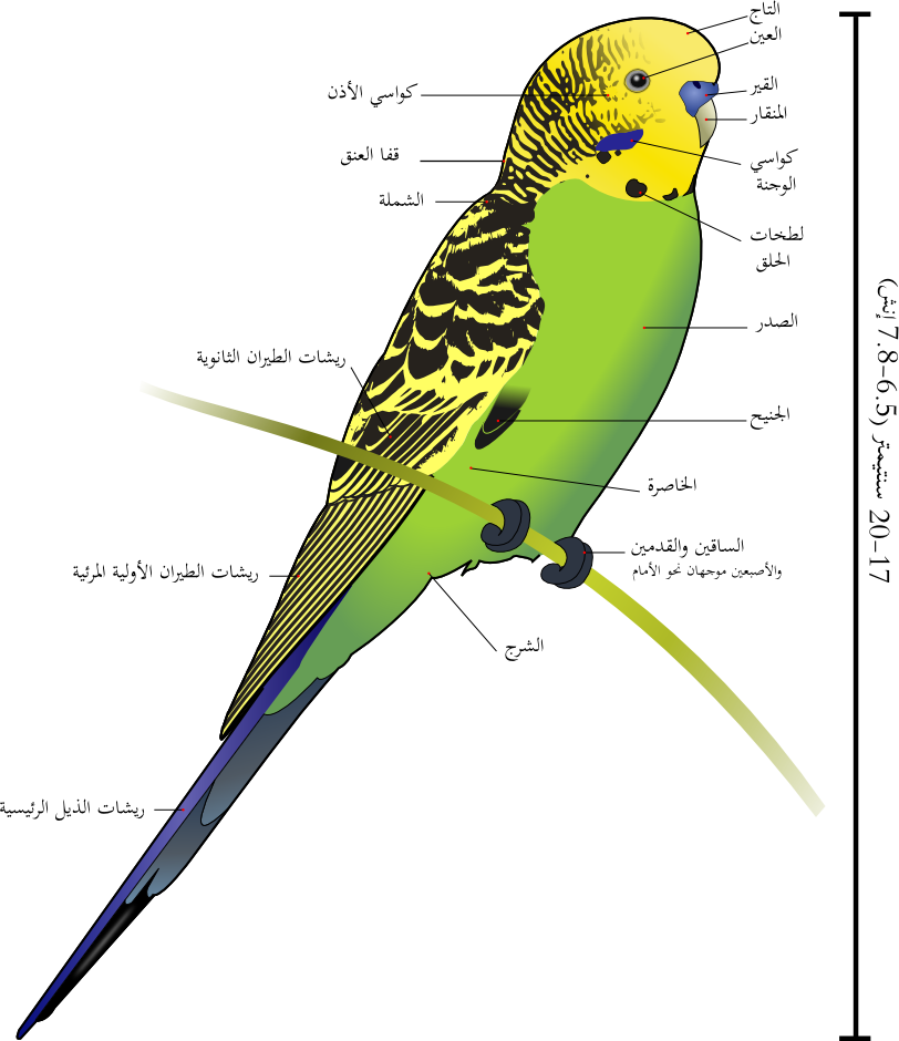 رسم يُظهر الملامح الظاهرة لببغاوات الدرّة.